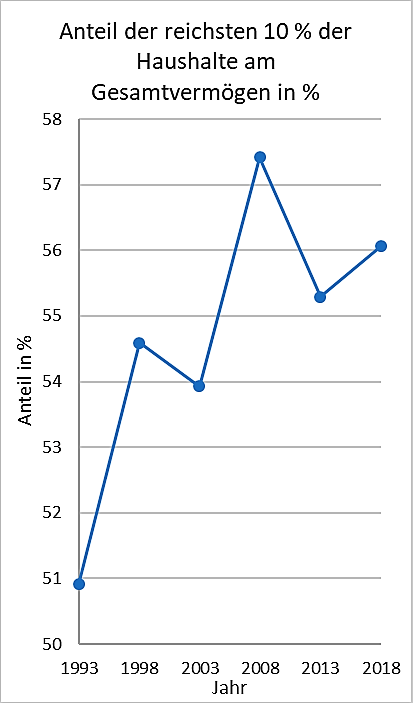 basierend auf Darstellung von Albers, Bartels, Schularick 2020. Die zugrundeliegende Untersuchung umfasste auch Geschäfts- und Immobilienvermögen sowie Top-Vermögen, die nicht in SOEP-Daten erfasst sind.